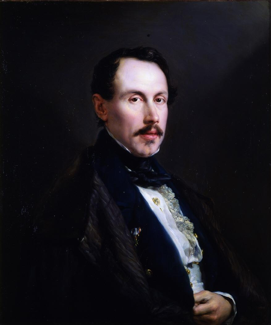 Retrato del escultor español Josep Piquer i Duart (1806-1871). Fue donado en 1891 por la viuda del escultor, Emilia Llull, a la Real Academia de Bellas Artes de San Fernando.